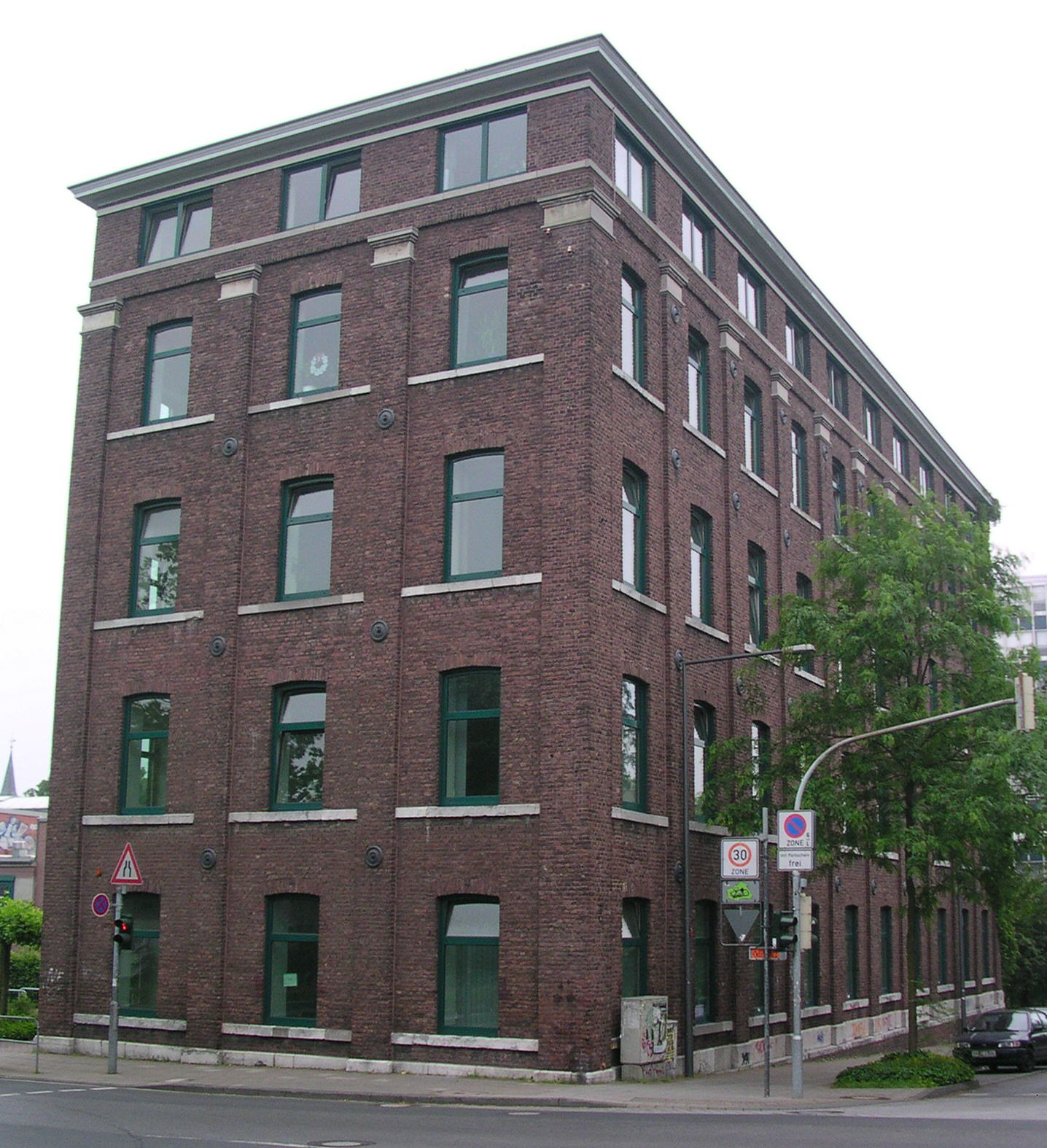 Aachen, Templergraben-Eilfschornsteinstraße, frühere Spinnerei Morse und Söhne, heute "Backsteingebäude" (Verwaltungsgebäude) der RWTH Aachen